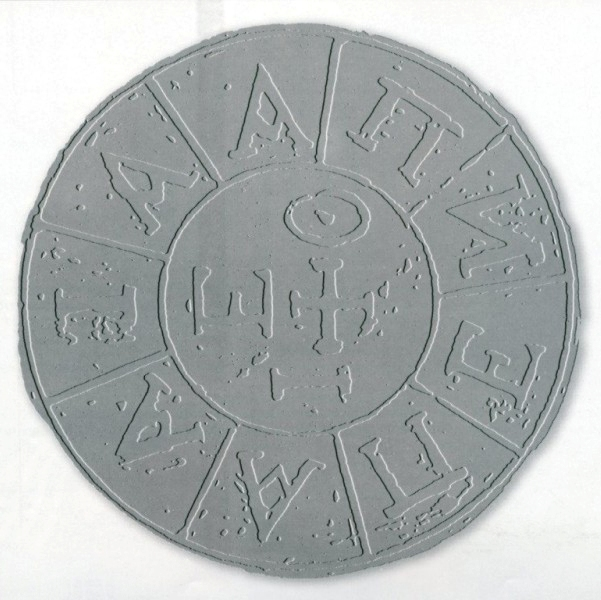 Σφραγίδα της Φιλικής Εταιρείας.